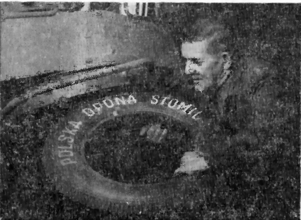 Stomil Poznań, pierwsza powojenna opona i mistrz Władysław Boruczkowski, 30.04.1945